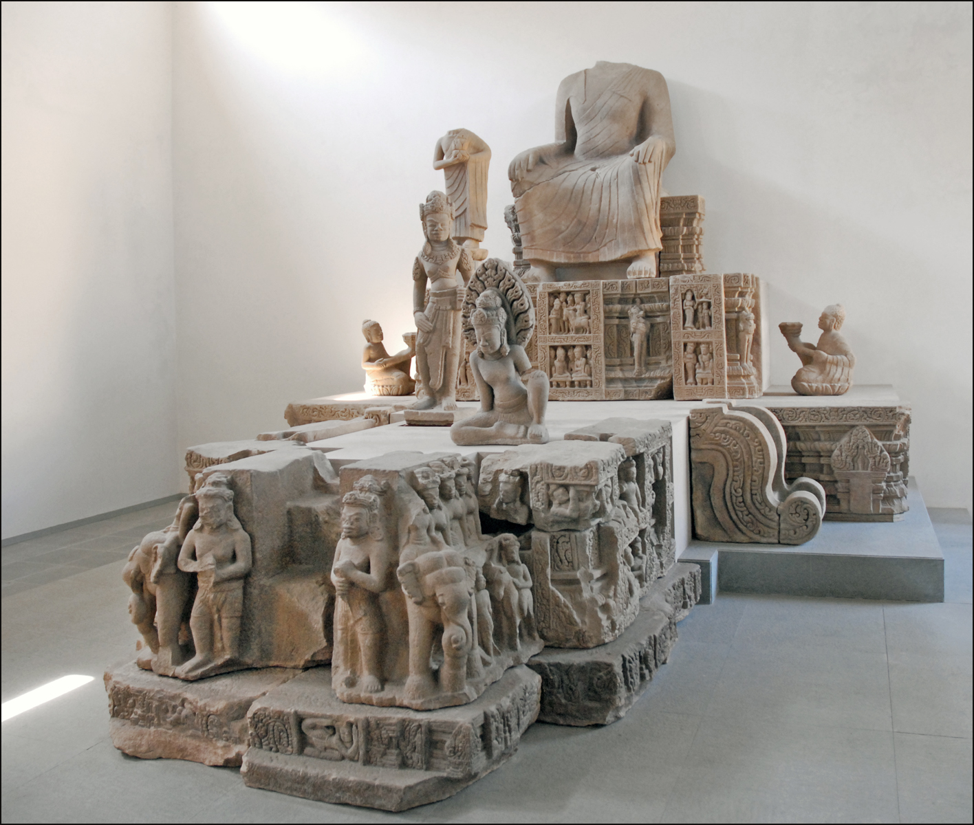 Piédestal : Au centre : Bouddha (Buddha), entouré de Bodhisattva et de moines Style de Dong Duong fin IXè siècle Construit par l’École Française d’Extrême-Orient en 1915, le musée fut initialement baptisé Musée Henri Parmentier (nom de l’un des premiers explorateurs des sites du Royaume du Champa). Les oeuvres sont classées par provenance et par période, ce qui permet de suivre, de salle en salle, l’évolution de l’art cham au niveau de la sculpture. La majorité des objets proviennent des sites de Tra Kieu (ancienne capitale administrative du Royaume du Champa), de My Son, de Dong Duong (centre bouddhiste) et de Thap Man.